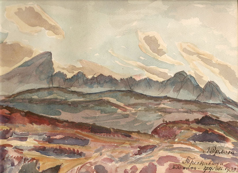 Réproduction